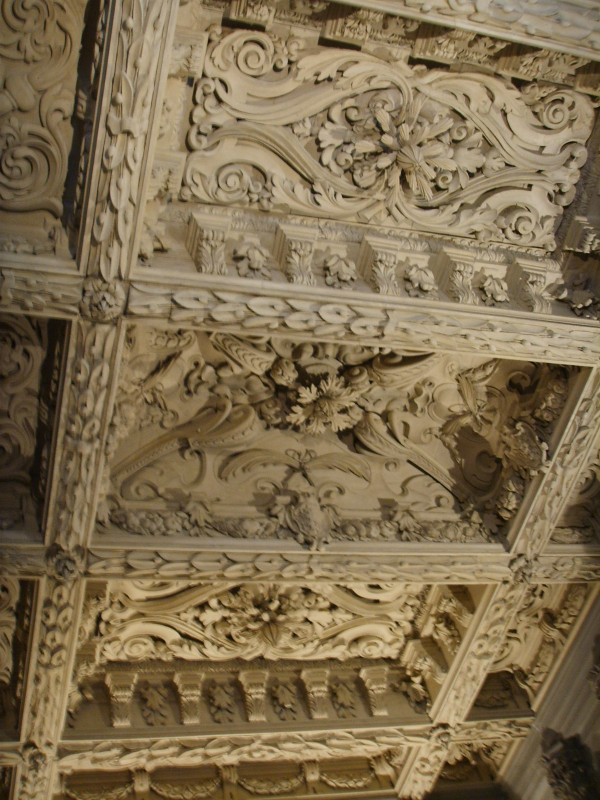 Santo Stefano al Ponte, copertura del coro (legno intagliato e coperto da stucco)